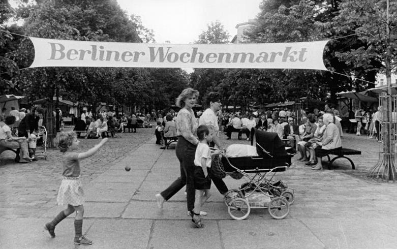 Berlin, Arkonplatz, Wochenmarkt Zum Beitrag: "Wo nischt rinkommt, kommt nischt raus"- Marktleben mit Berliner Witz ADN-ZB Grimm - 29.6.1987 - "Berliner Wochenmarkt" auf dem Arkonplatz im Stadtbezirk Mitte. Hier hat es vor hundert Jahren schon einmal Händler gegeben, die mit weithin schallender Stimme ihre Waren anboten. (Hierzu gehören die Fotos 1987-0629-300N-307!)